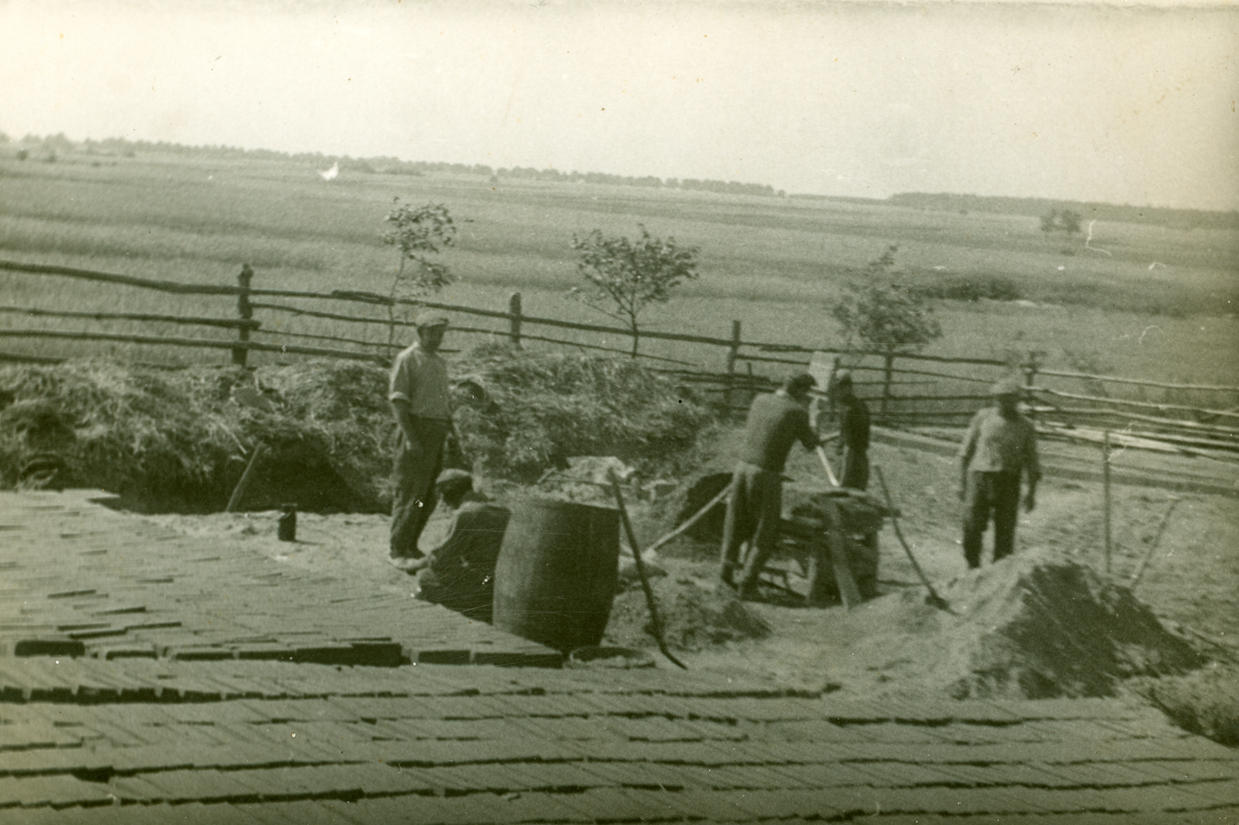 Formowanie cegieł w powojennej Polsce. Strzałki.